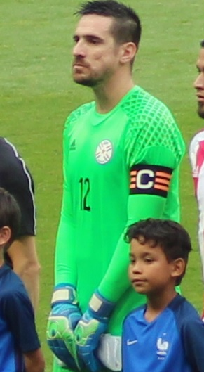 Antony Silva, capitaine de la sélection paraguayenne avant un match amical contre la France, le 2 juin 2017 au Roazhon Park (Rennes)